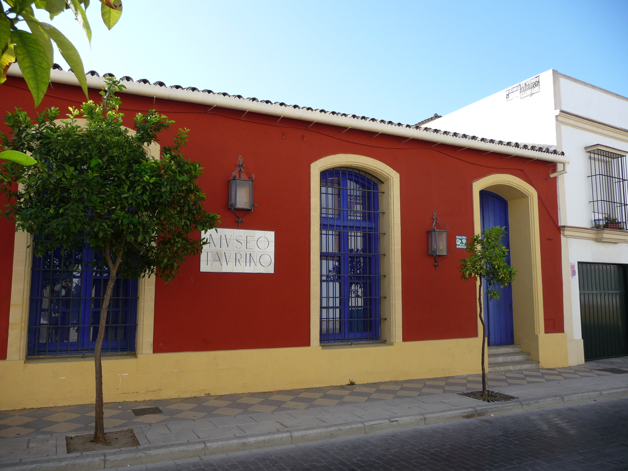 MuseoTaurino-JerezFra-p1040425.jpg